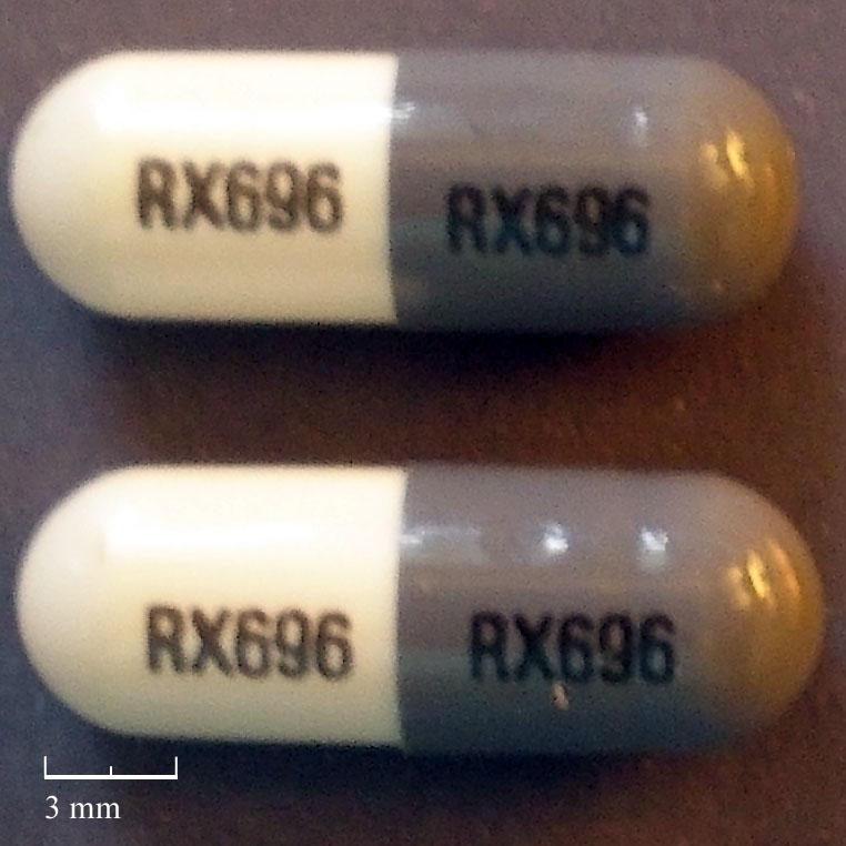 Minocycline 150 mg Capsule.